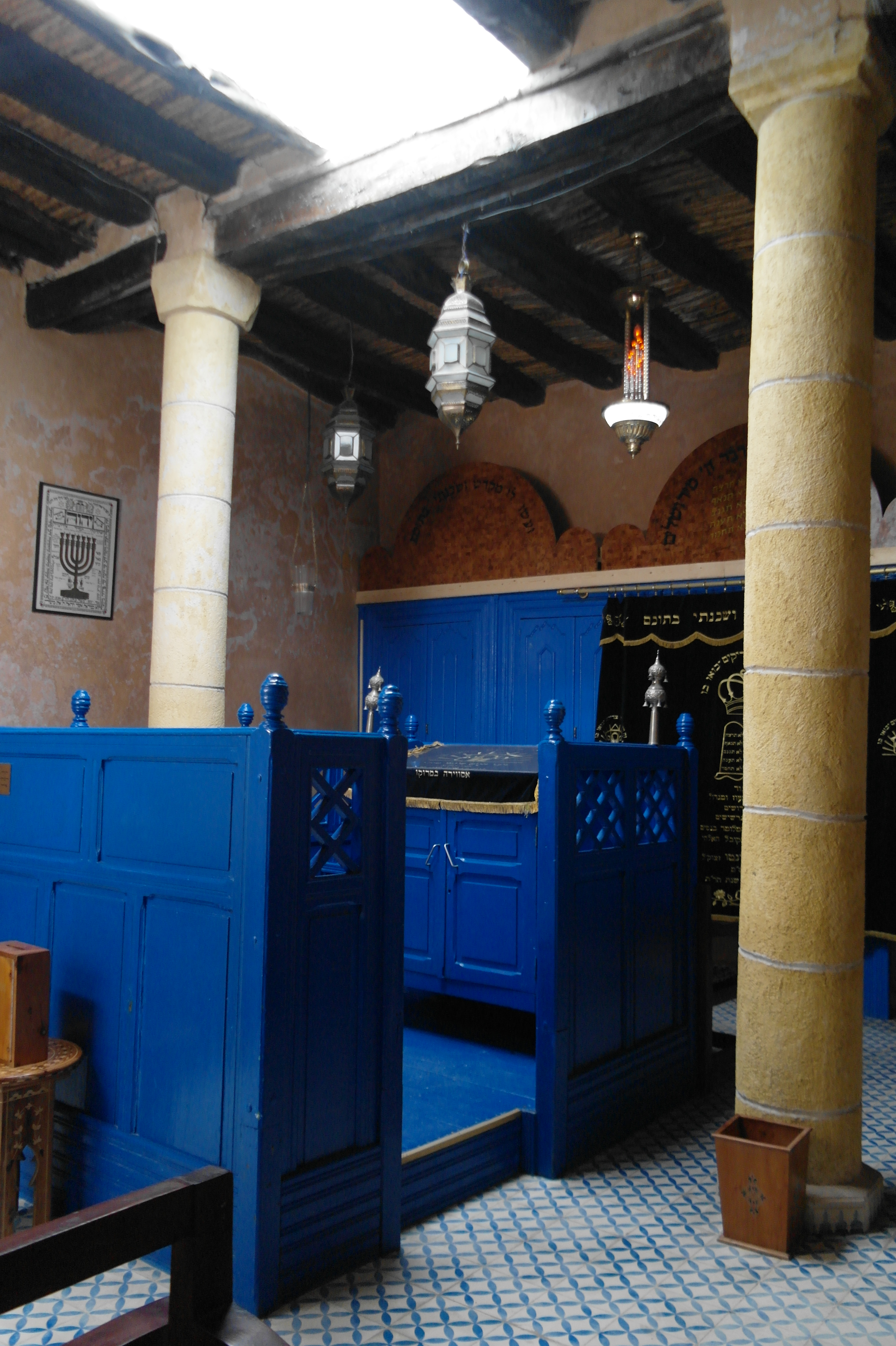 Chaim Pinto Synagogue